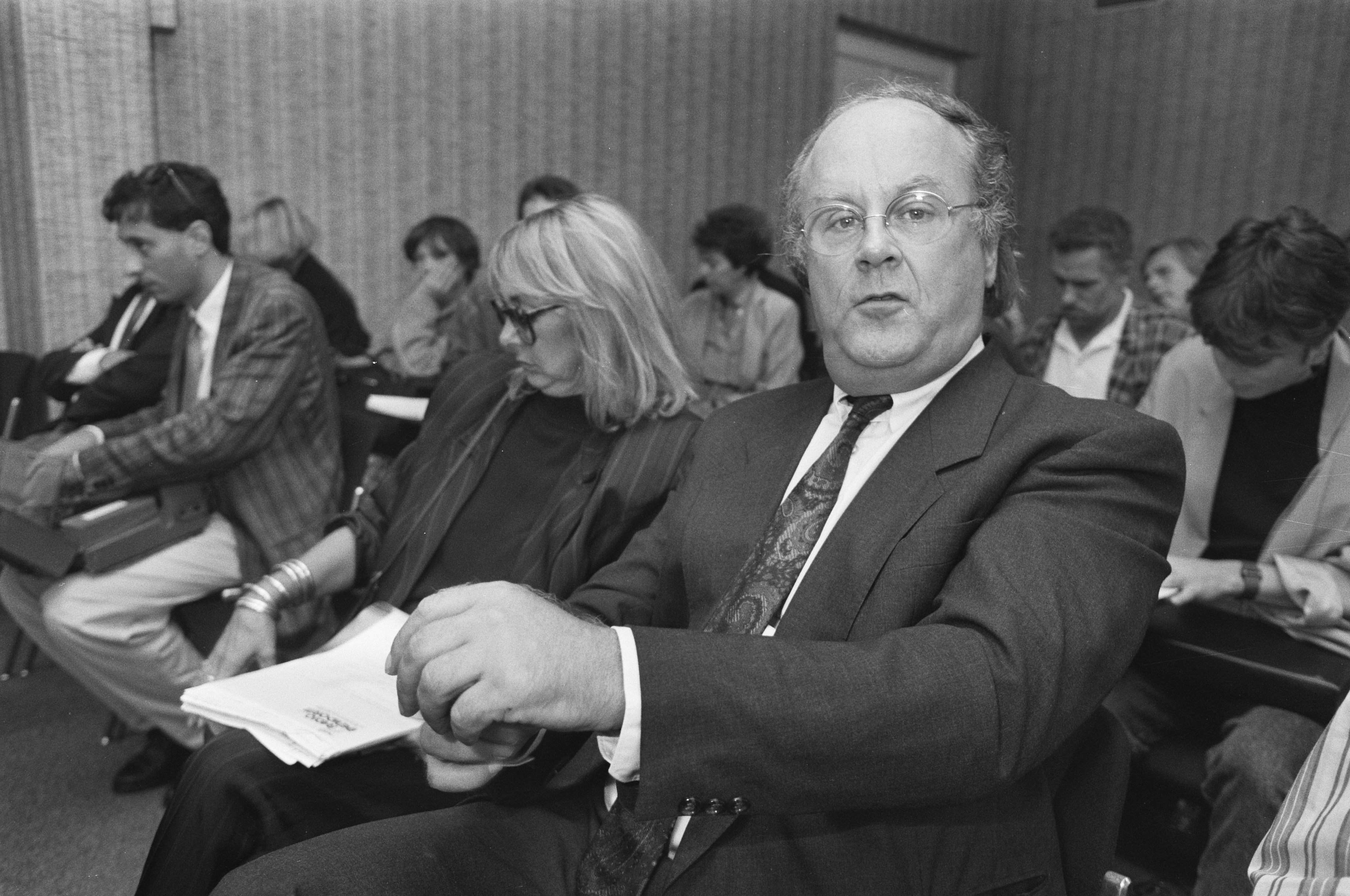 Collectie / Archief : Fotocollectie Anefo Reportage / Serie : [ onbekend ] Beschrijving : Kort geding van radiostation Cable One tegen uitzendverbod; Willem van Kooten in de rechtszaal Datum : 6 september 1989 Trefwoorden : processen, radiostations, rechtszalen Persoonsnaam : Kooten, Willem van Fotograaf : Croes, Rob C. / Anefo Auteursrechthebbende : Nationaal Archief Materiaalsoort : Negatief (zwart/wit) Nummer archiefinventaris : bekijk toegang 2.24.01.05 Bestanddeelnummer : 934-4954